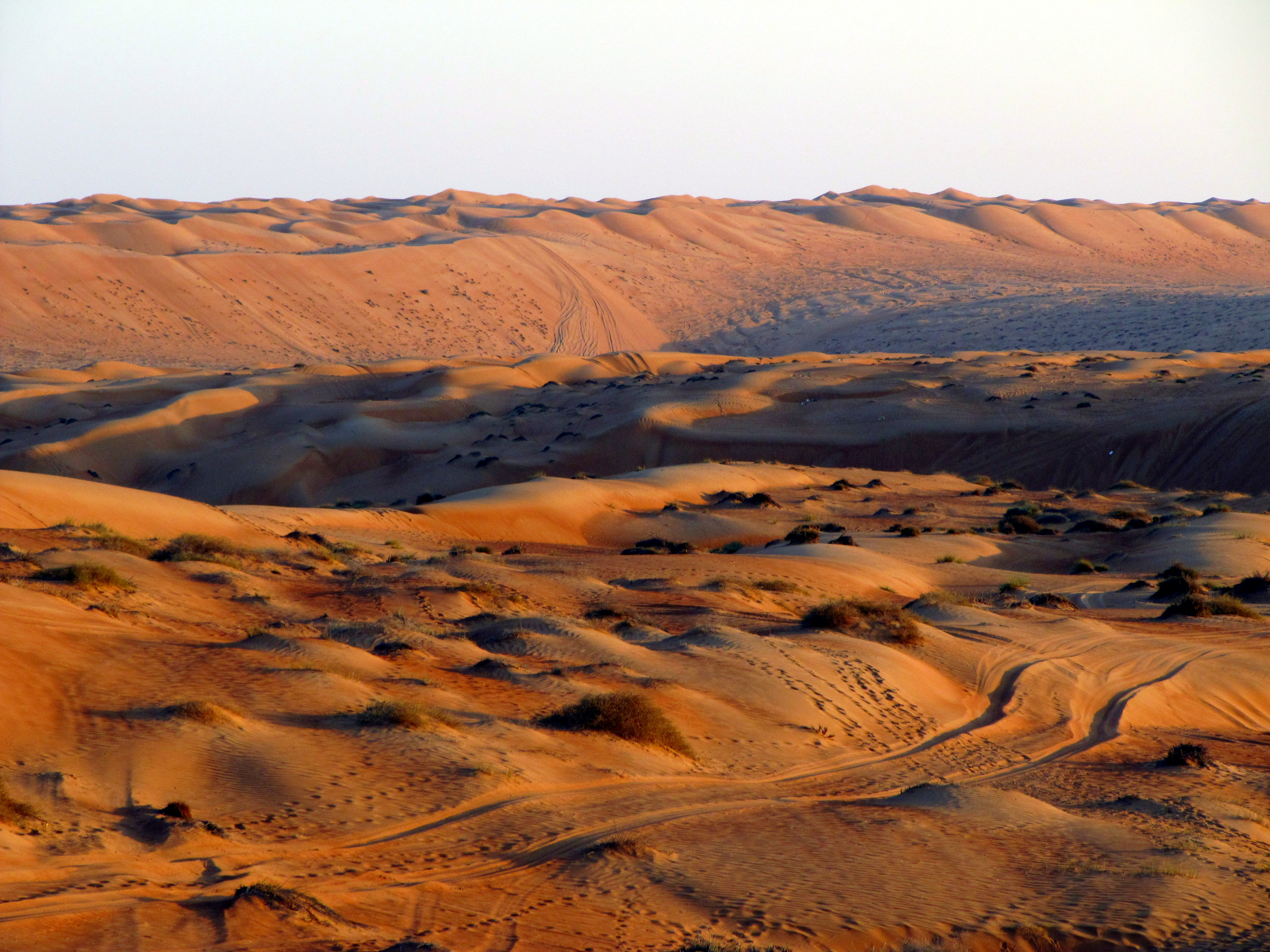 Omanska puščava Vahiba.